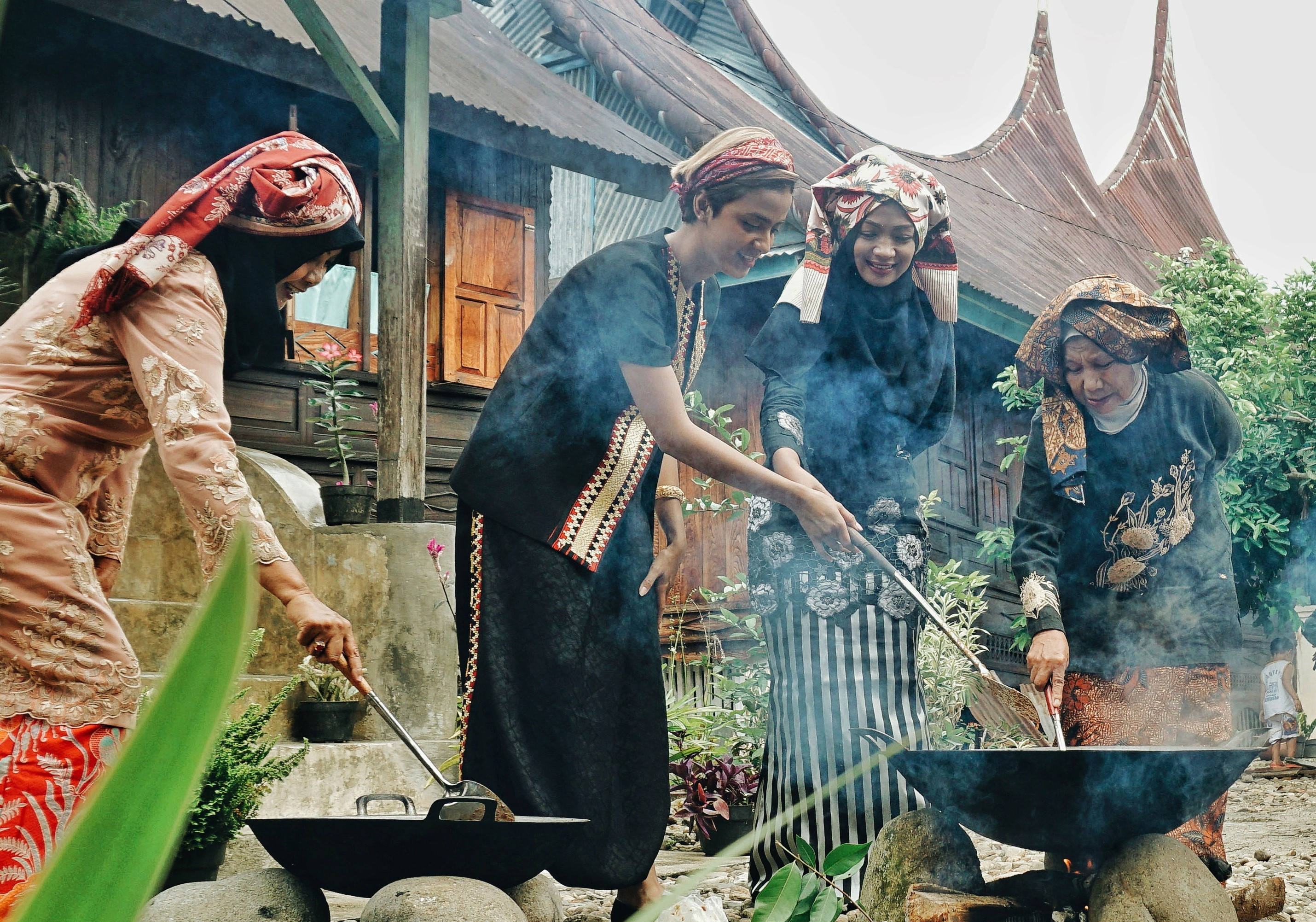 Memasak Rendang